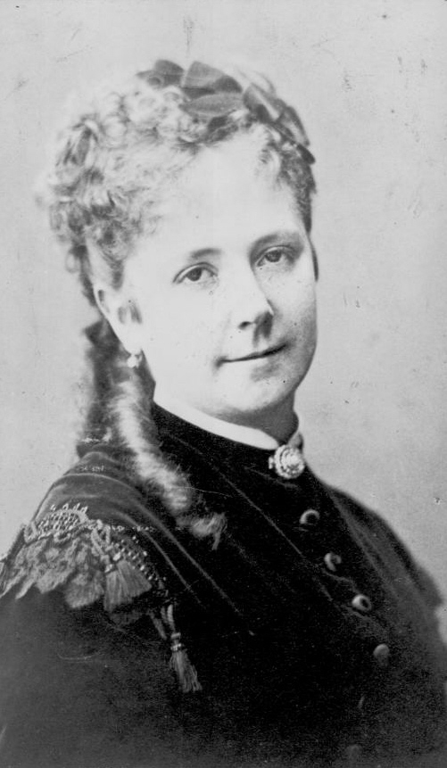 Lina Mayr (Schauspielerin und Sängerin, 1844–1914)